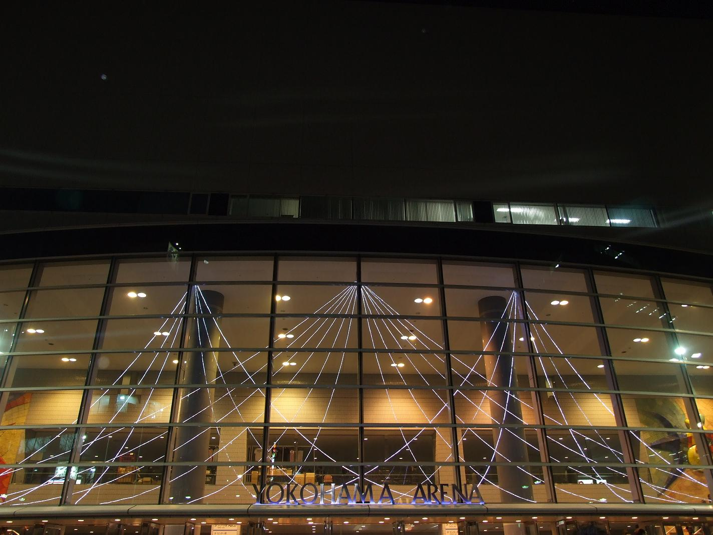 Yokohama Arena tras la World GP 2008 que se adjudicó Remy Bonjasky.